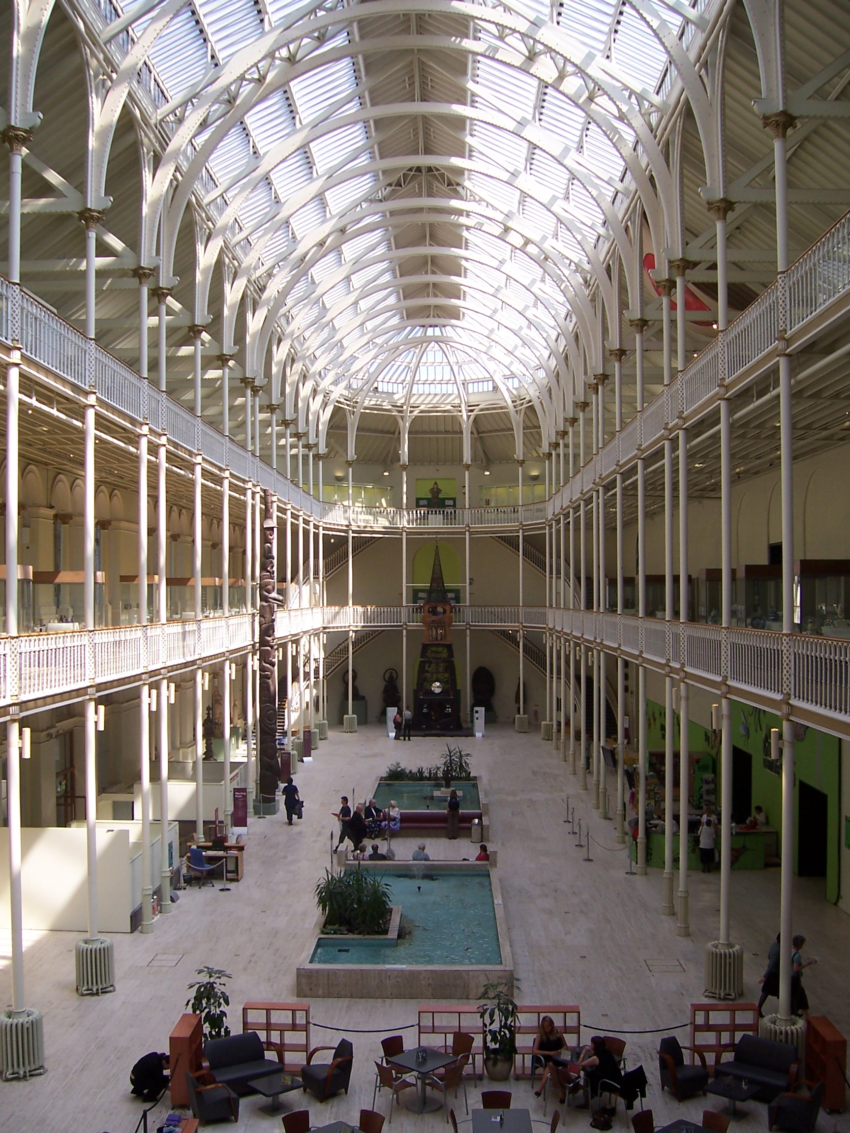 Photo du Hall principal du Musée Royal d'Écosse (Royal Museum of Scotland) à Édimbourg. Prise par moi-même le 11 mai 2006.